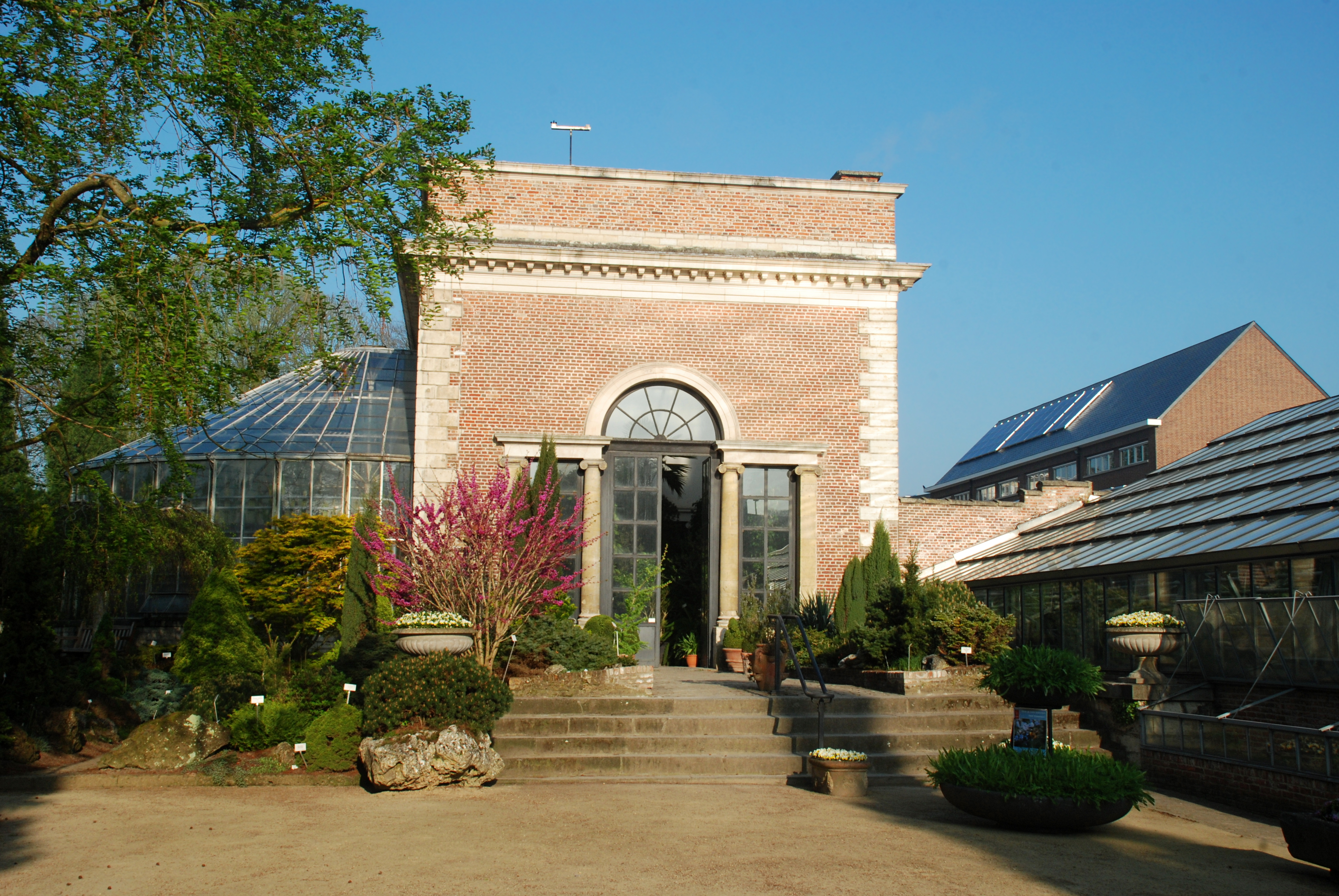 Belgique - Louvain - Jardin botanique (Kruidtuin) - orangerie néo-classique (architecte Charles Vander Straeten)